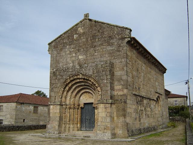 Igreja da aldeia de Bravães, Portugal.